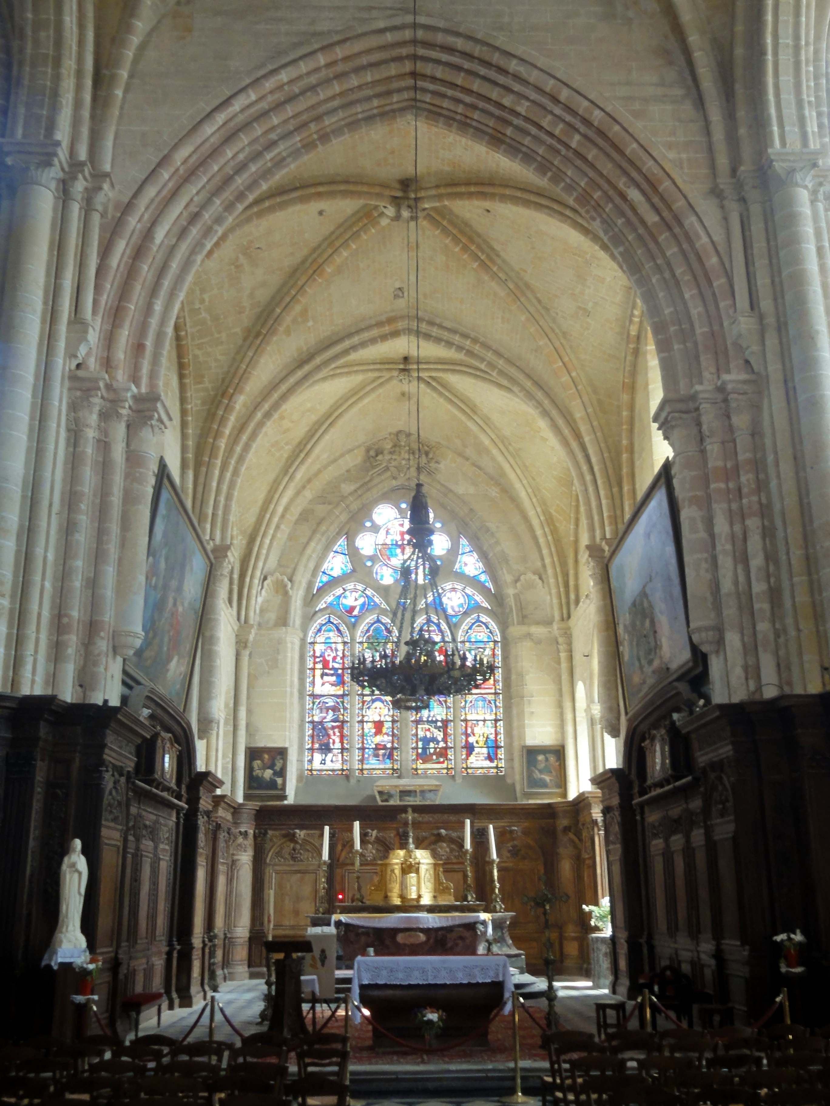 Intérieur de l'église - voir le titre du fichier.